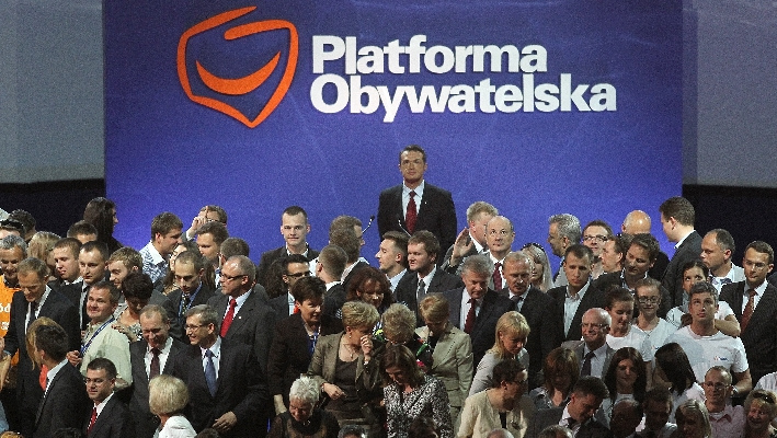 Ogólnopolska konwencja Platformy Obywatelskiej Ergo Arena 11 czerwca 2011